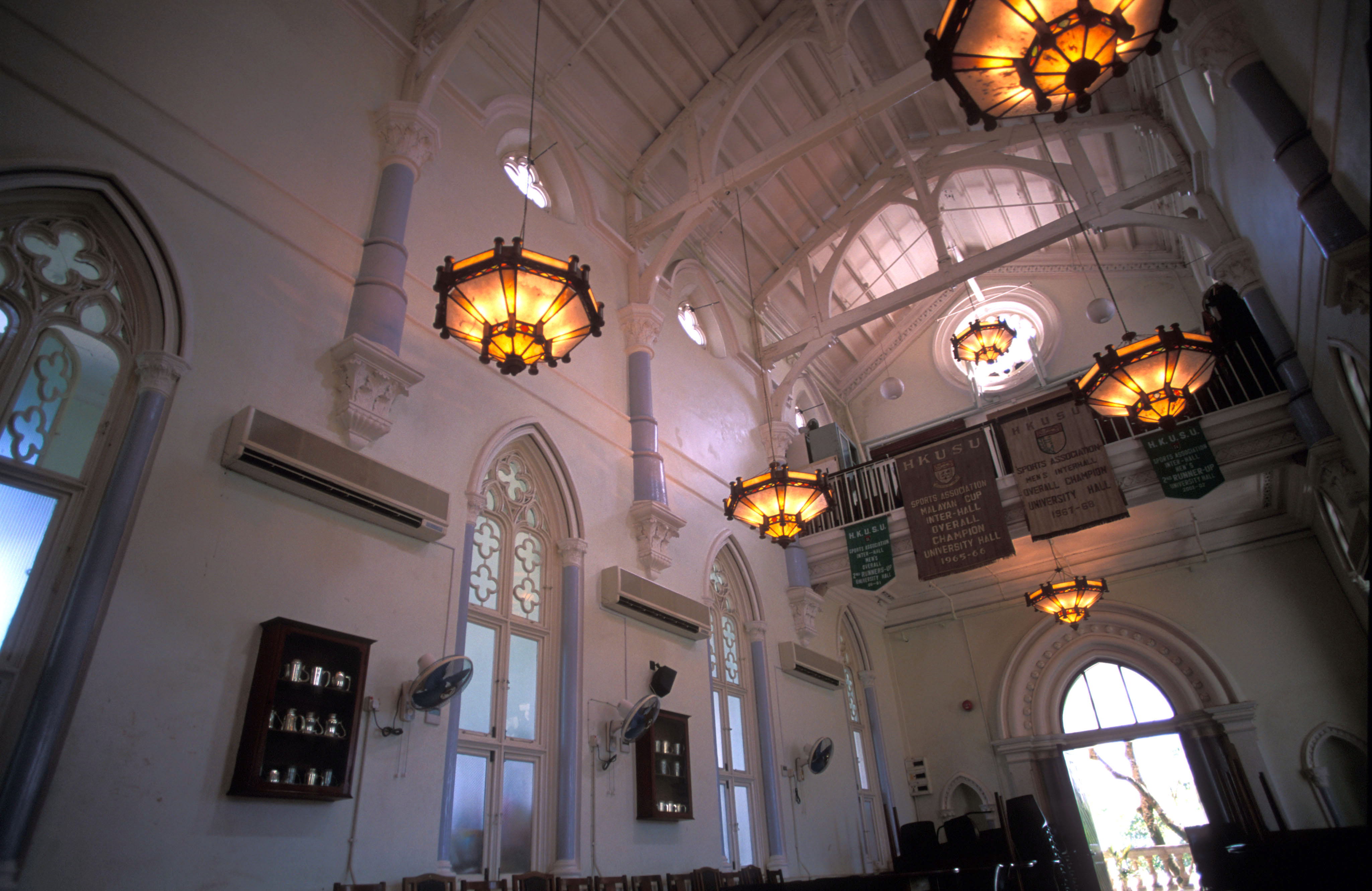 中文（香港）: 曾為教堂，現為大學堂宿舍的飯堂